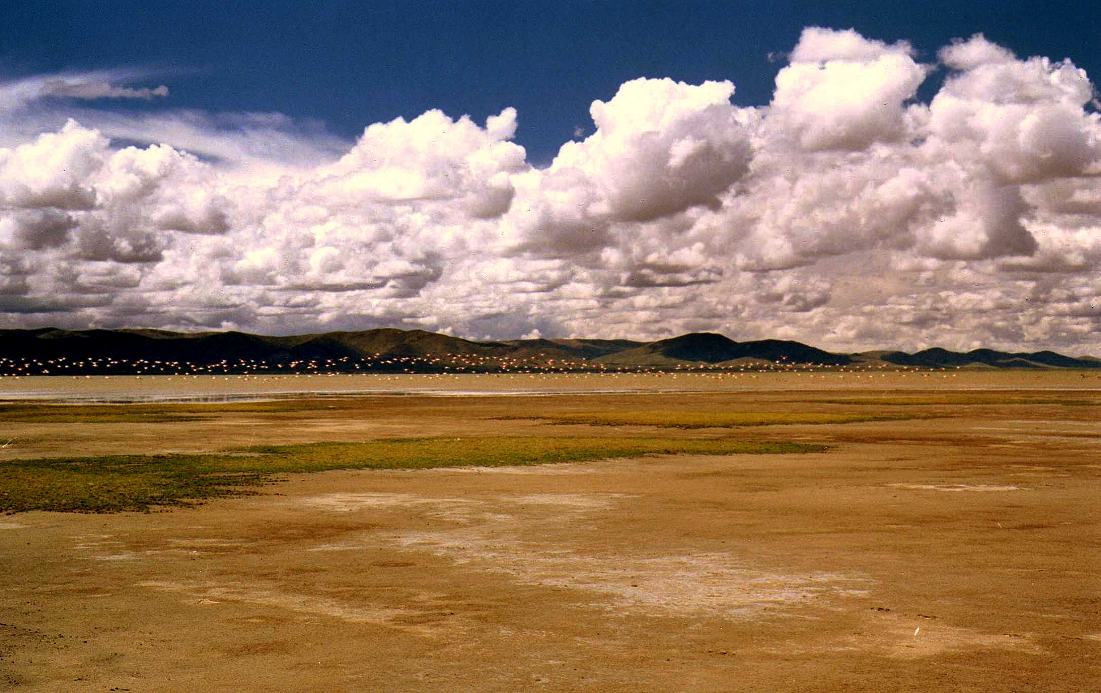 Monumento Natural Laguna de los Pozuelos, Jujuy, Argentina